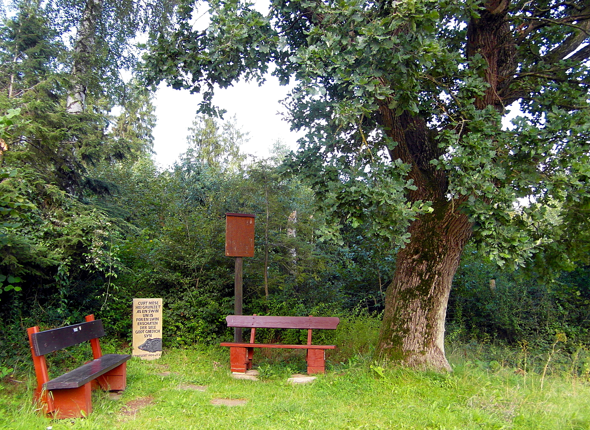 Rastplatz beim Mesenstein am Panoramaweg am Deisterrand bei Bad Münder